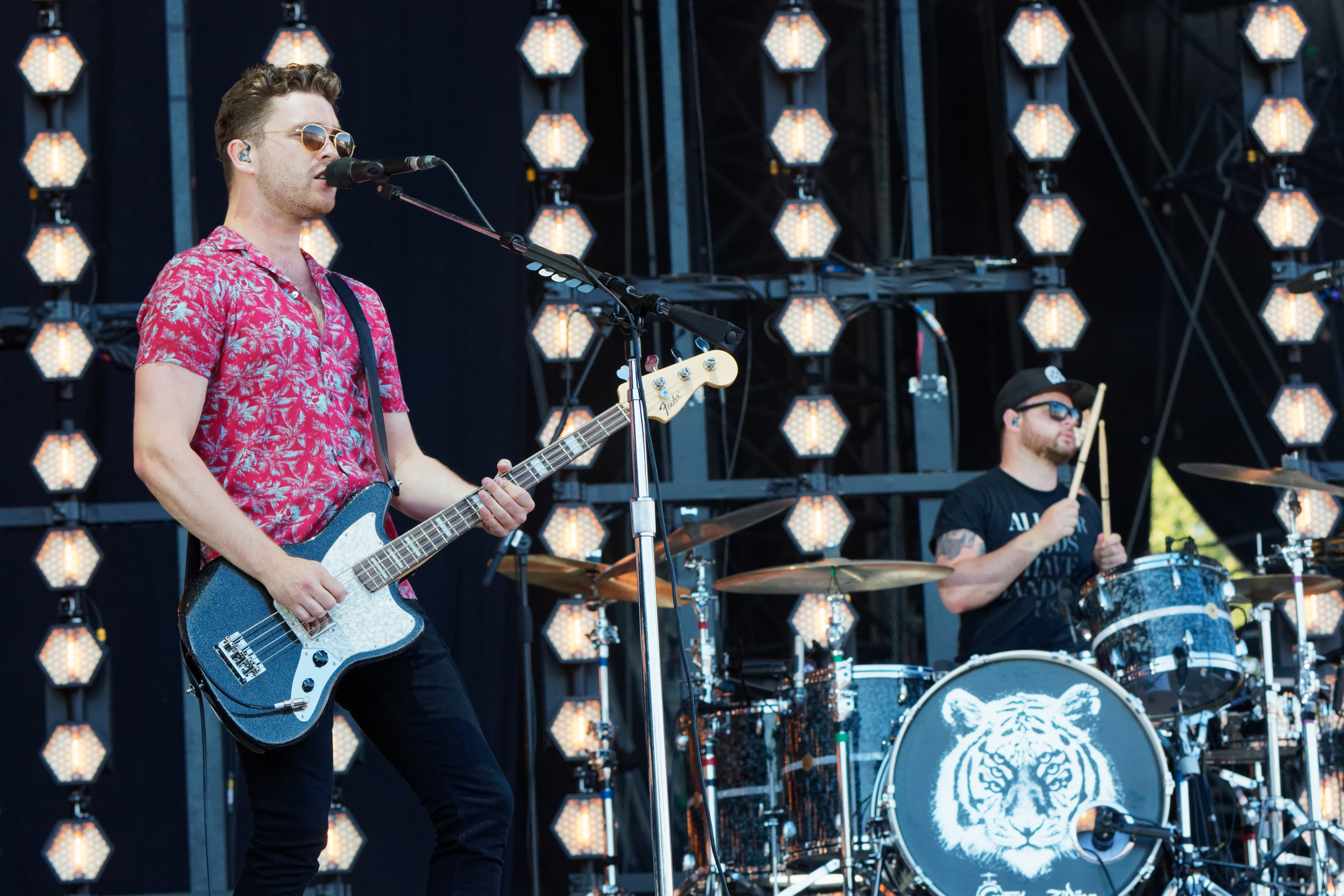 Royal Blood en concert lors du festival des vieilles charrues 2017.